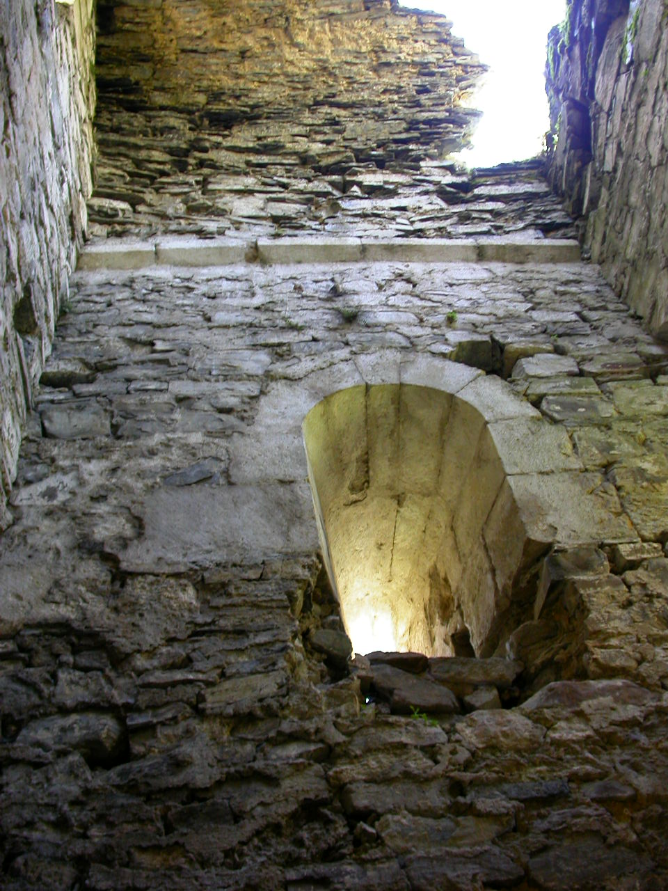 Foto de las Ruinas del Monasterio de San Román de Entrepeñas